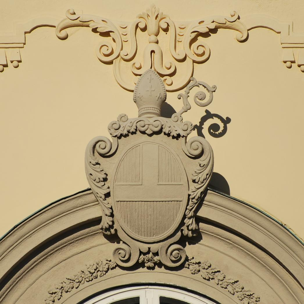 Wappen des Stiftes an der Südfassade